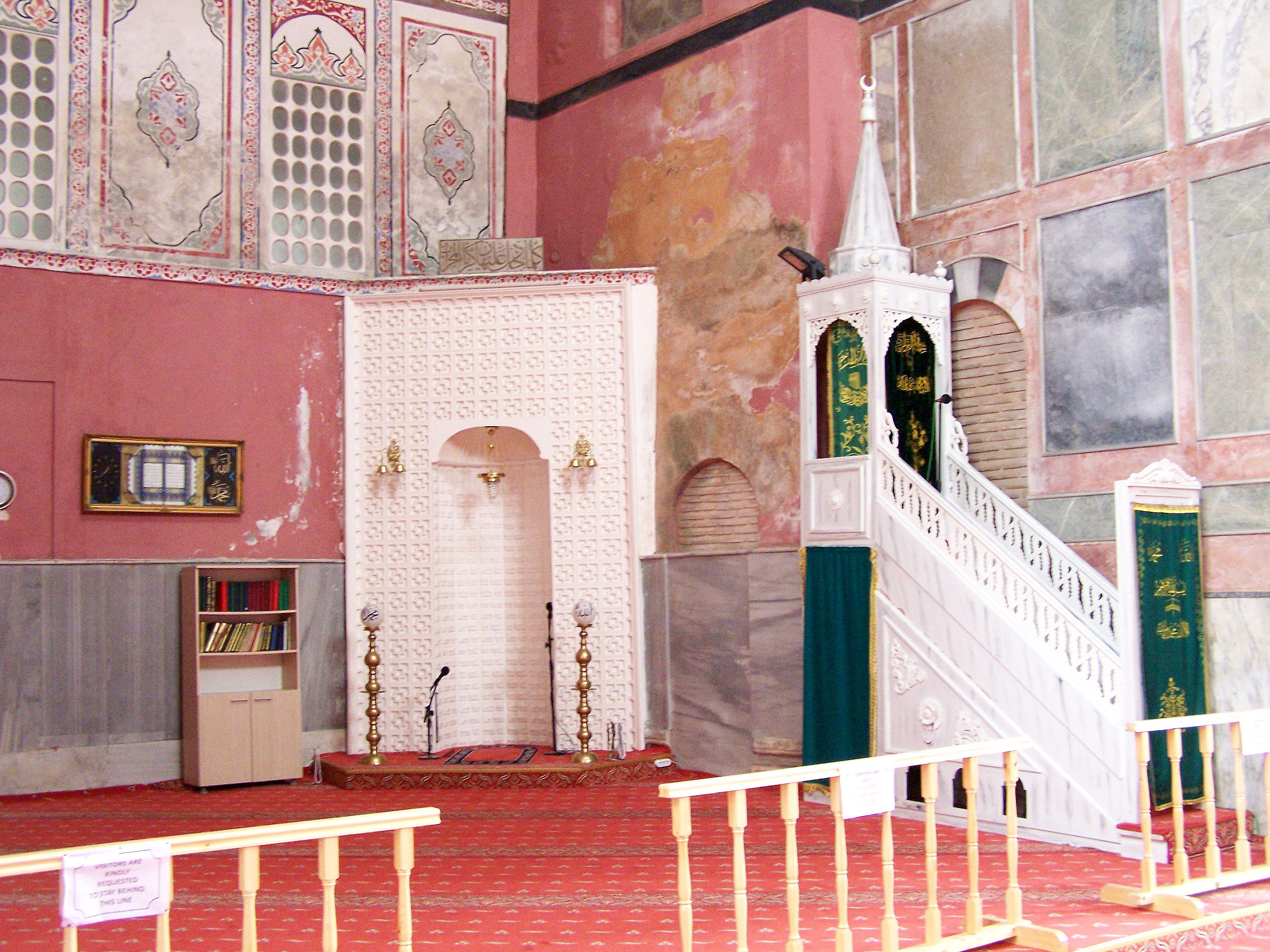 Mihrap and minbar of Kalenderhane Camii in Fatih, İstanbul, Turkey